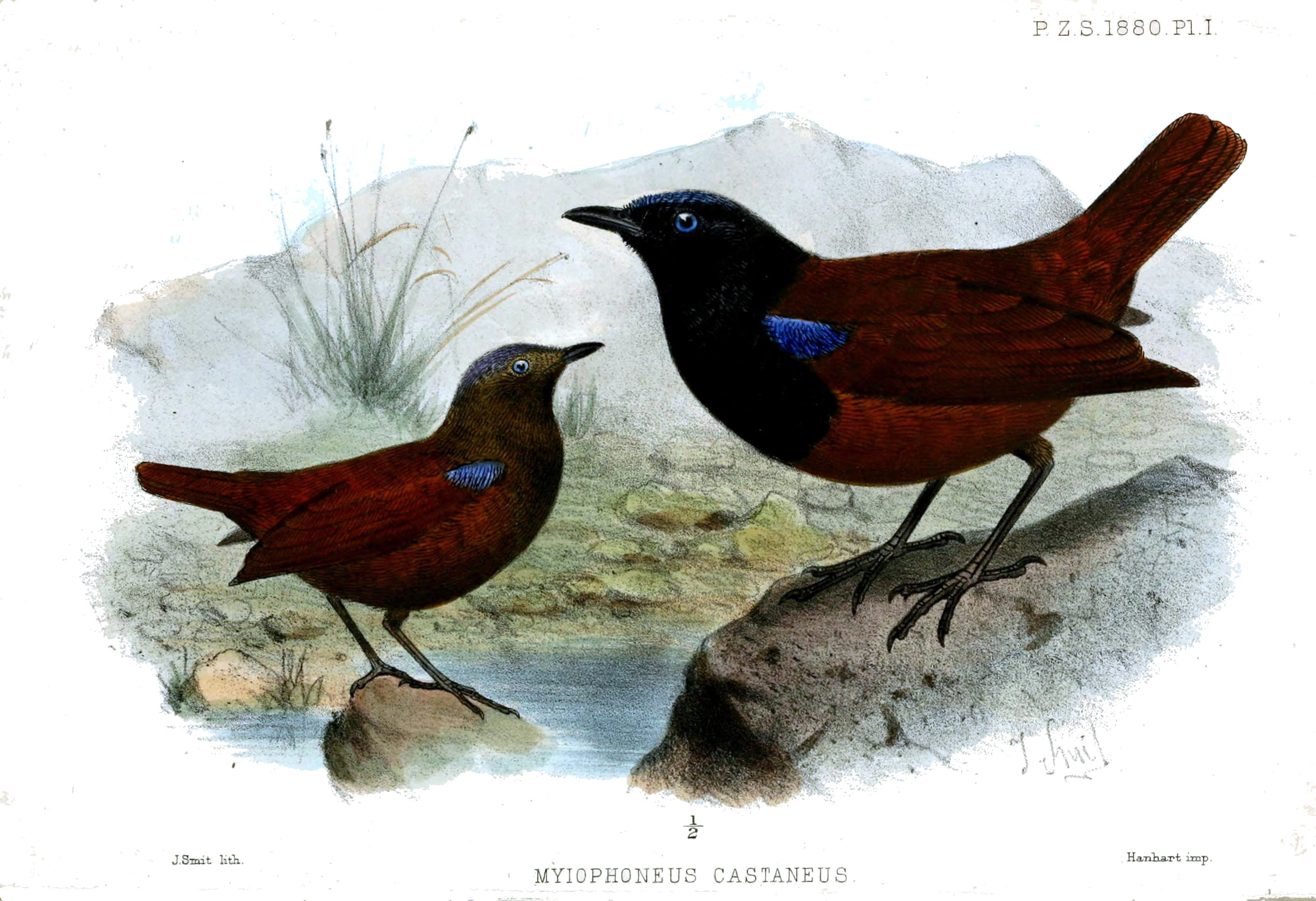 Myiophoneus castaneus